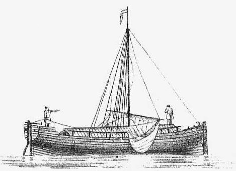 Облас или обласок